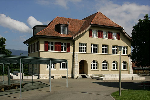 Schulhaus in Wahlen